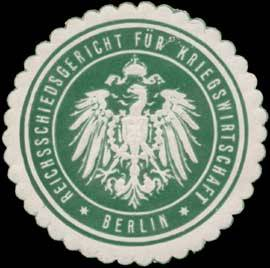 Sealing stamp Title: Reichsschiedsgericht für Kriegswirtschaft Berlin Description: grün, weiß, geprägt Place: Berlin size: 4 cm